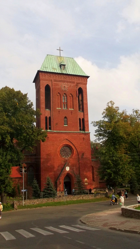 Kamień Pomorski, kościół katedralny p.w. śś. Wojciecha i Jana Chrzciciela, kon. XII-XV